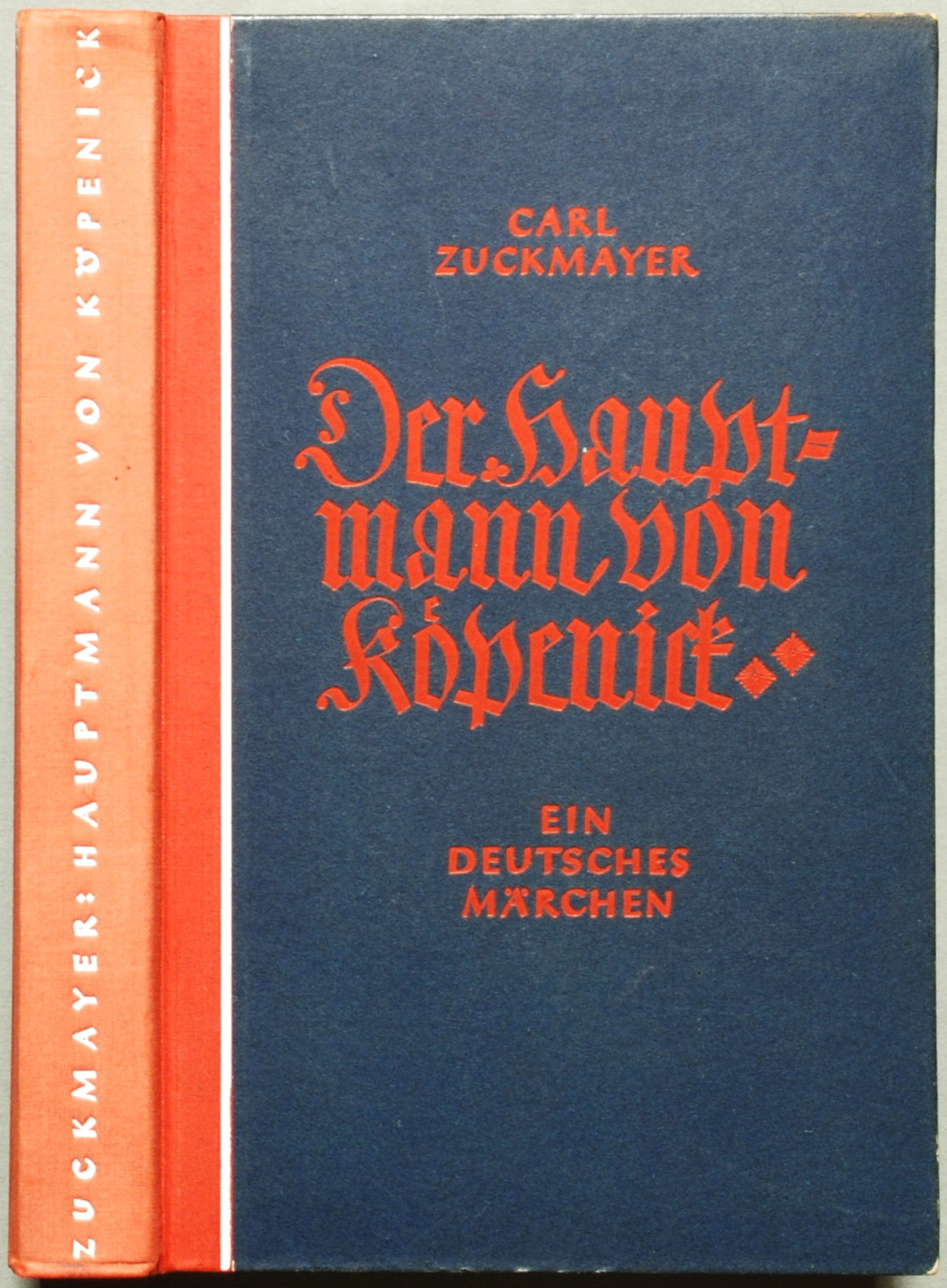 Zuckmayer, Carl: Der Hauptmann von Köpenick. Ein deutsches Märchen in drei Akten. Halbleinen. Berlin: Propyläen [1930], 189 Seiten + 1 nicht paginierte Seite + 1 Blatt Motto + 1 Blatt Verlagsanzeigen; Wilpert/Gühring² 8